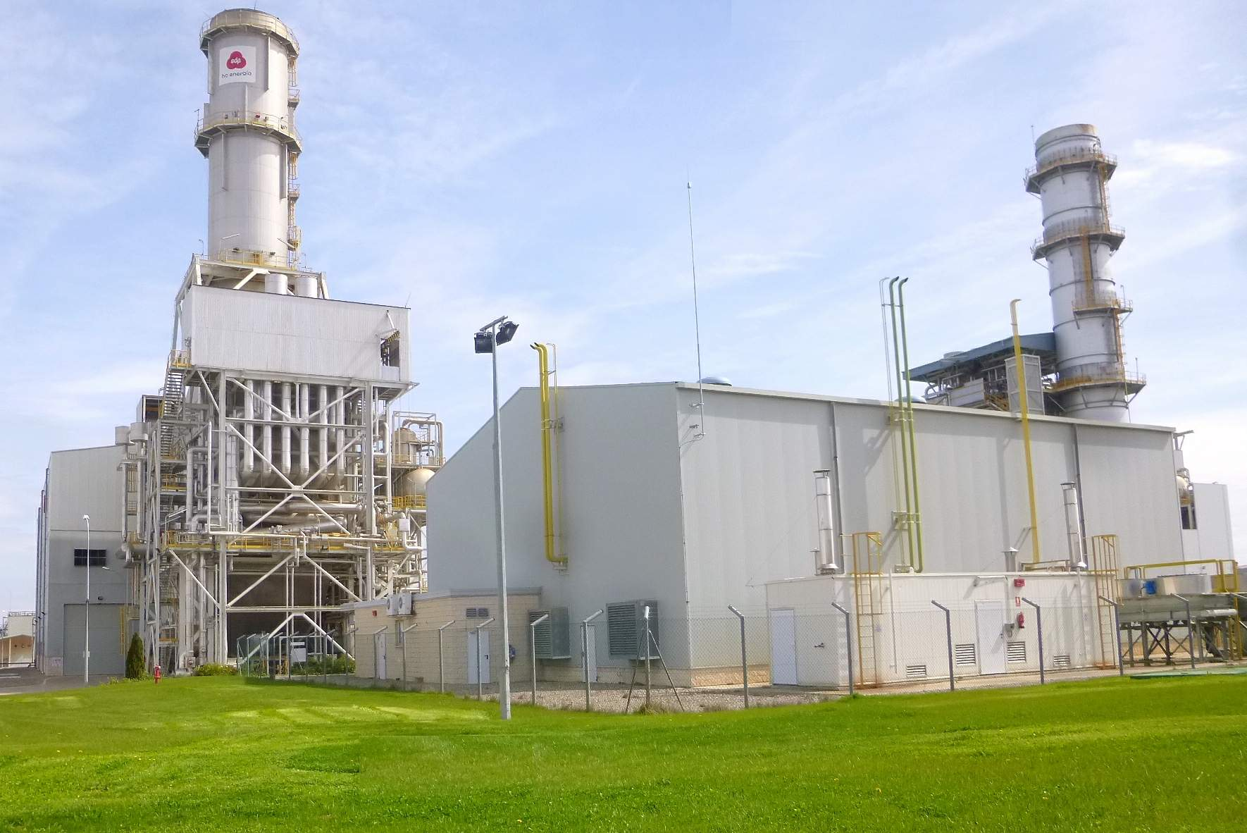 Castejón (Navarra) - Central térmica de ciclo combinado Elerebro (EDP HC Energía), Grupos I (Castejón 1) y II (Castejón 3)